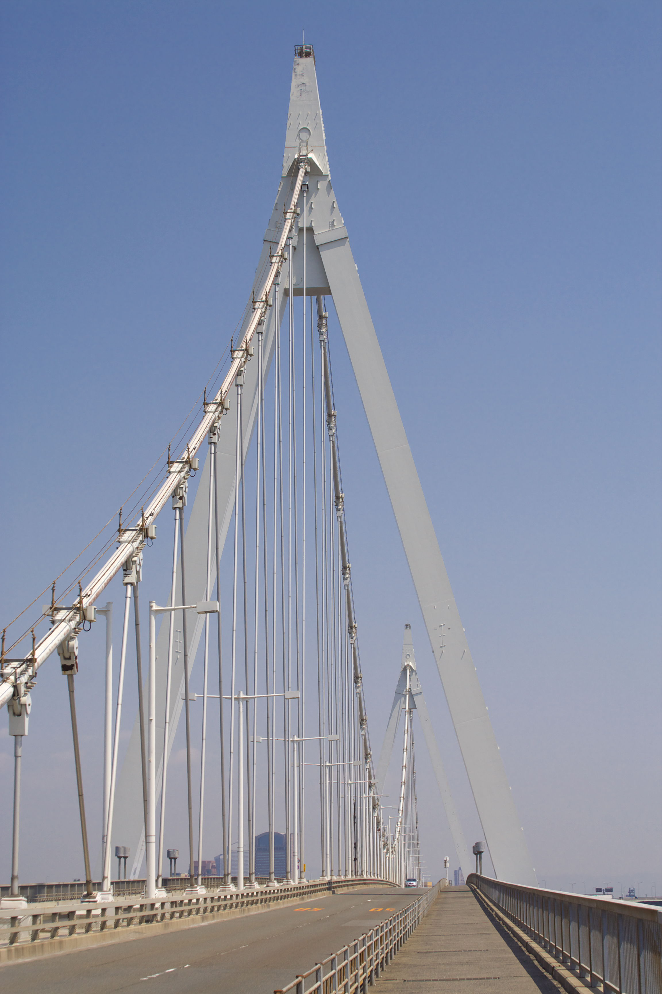 此花大橋（大阪市, 日本） / Konohana Ohashi Bridge Osaka, Japan